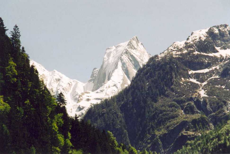 Der Piz Badile im schweizerischen Bergell, Kanton Graubünden (Ostalpen).